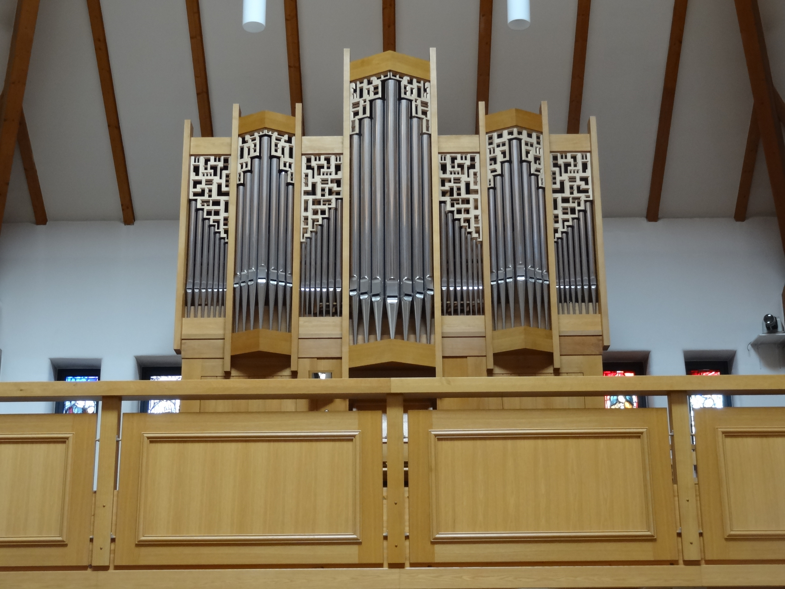 Schädler-Orgel (erbaut 1996) in der Pfarrkirche St. Johannes in Piflas (Markt Ergolding, Landkreis Landshut, Bayern)